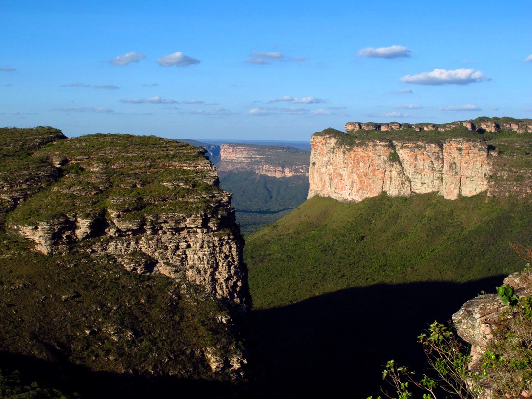 O morro do pai Inácio é um presente para os turistas